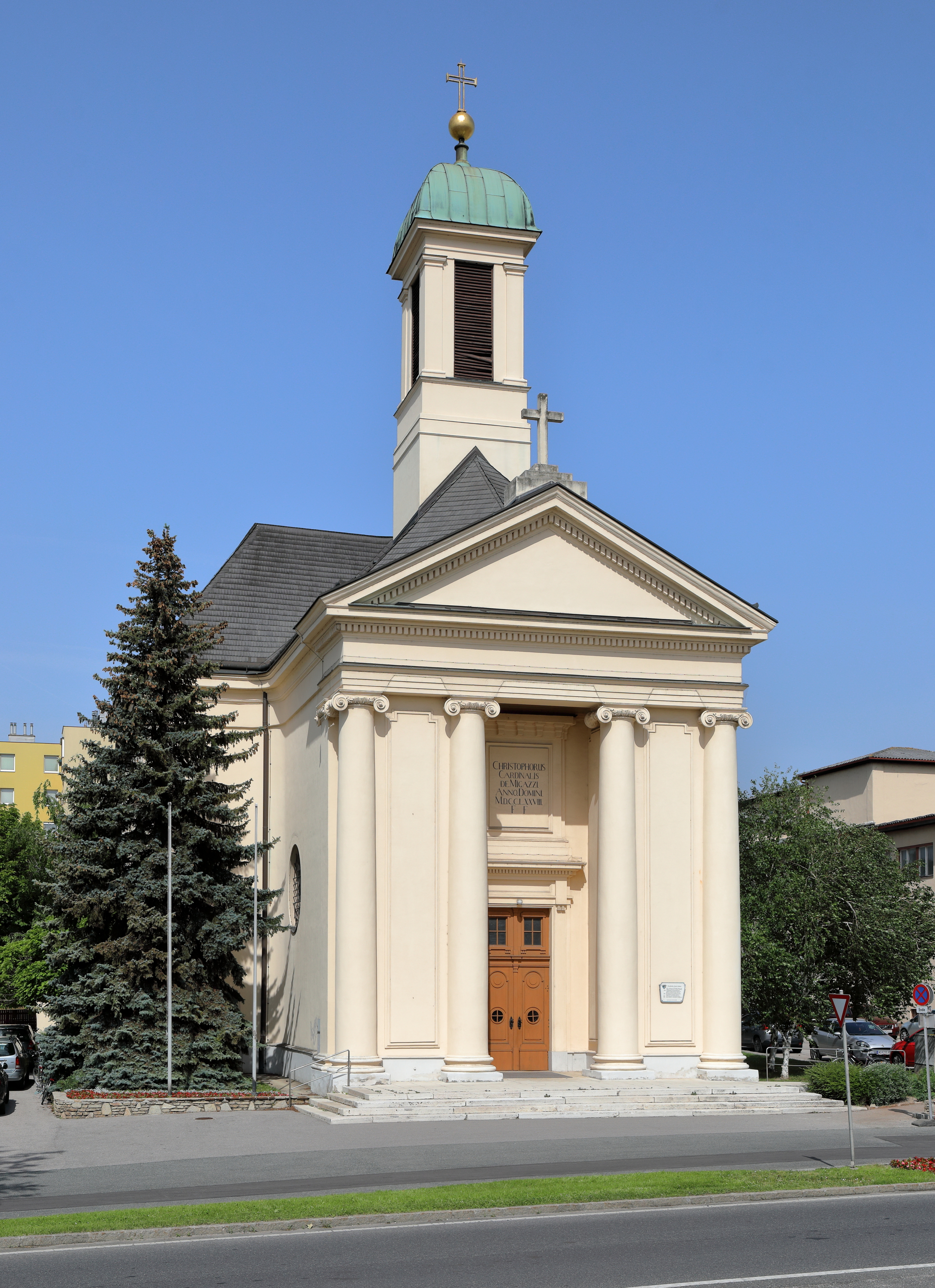 Ostansicht der röm.-kath. Pfarrkirche Maria Schnee in der niederösterreichischen Marktgemeinde Wiener Neudorf.